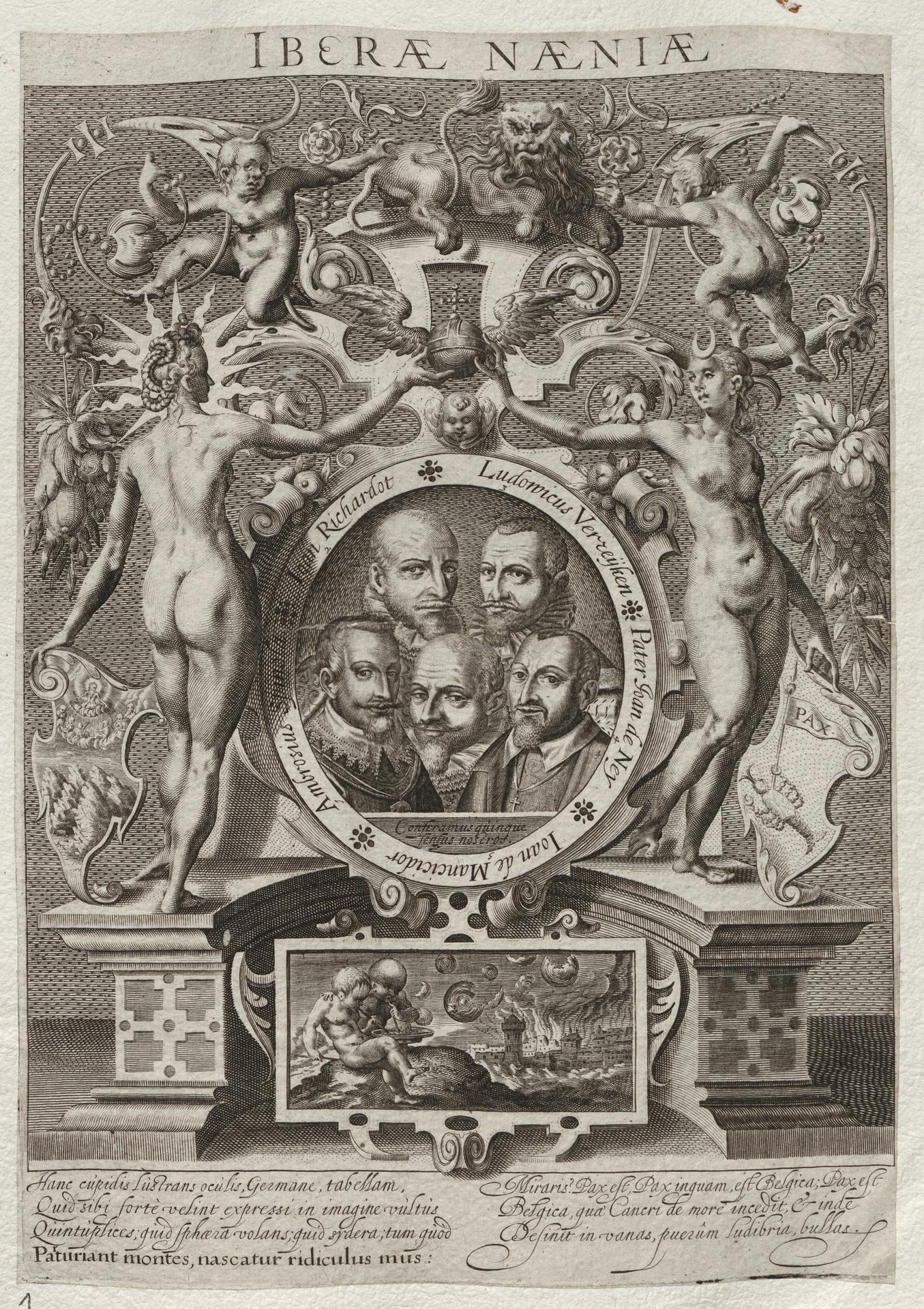 Grafik aus dem Klebeband Nr. 18 der Fürstlich Waldeckschen Hofbibliothek Arolsen Motiv: "Iberae Naeniae" "Ioan Richardt" (Jean Richardot), "Ludowicus Verreyken" (Lodewijk/Louis Verreycken), "Pater Joan de Ney" (Jan Neyen), "Ioan de Mancicidor" (Juan de Mancicidor), "Ambrosius Spinola" (Ambrosio Spinola)